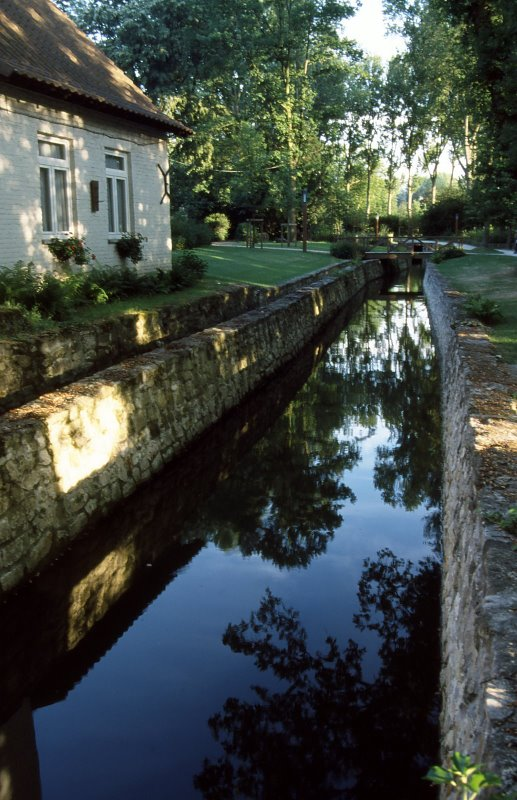 A Parc Malou és a Lindekemale vízimalom, valamint a Woluwe folyó csatornája, Brüsszel